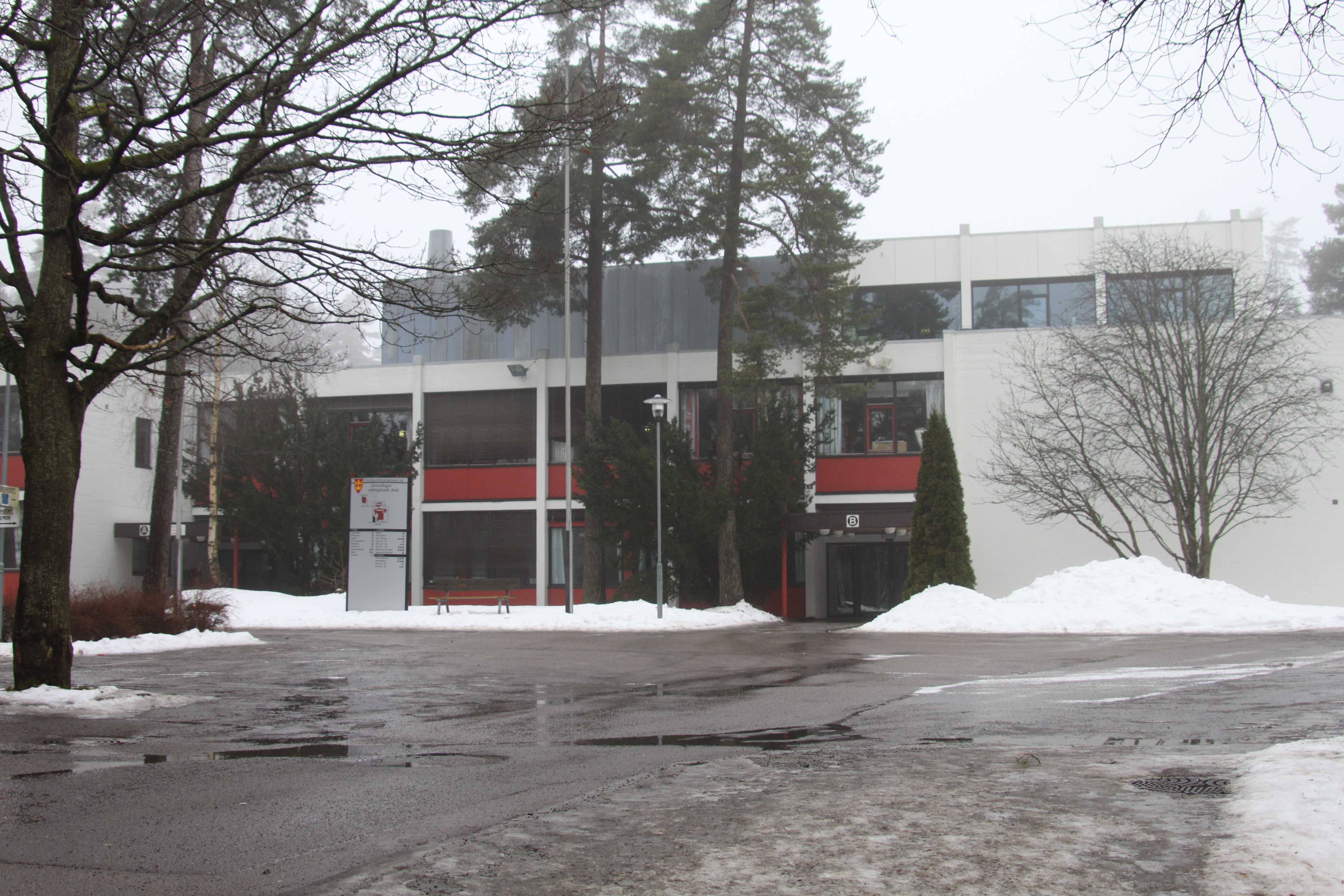 Greveskogen videregående skole, inngangen